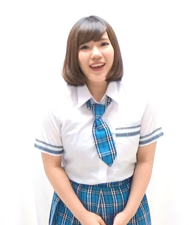 SIR6期候補生 チームI 利根 さやな 自己紹介